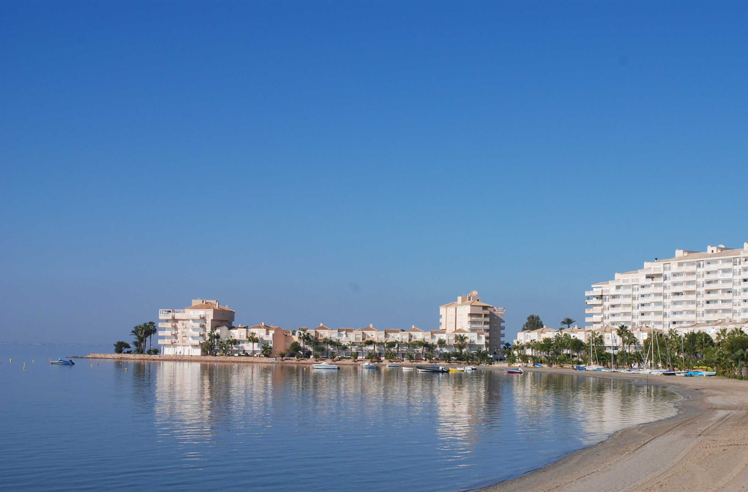 El Pedrucho, La Manga